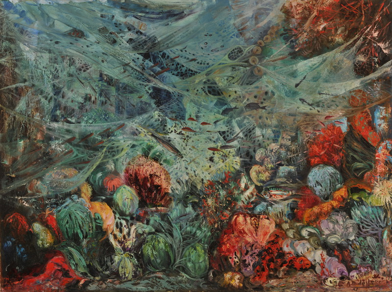 Óleo "La Huella del Hombre", año:1986,Autor: Antonio Domínguez del Haro